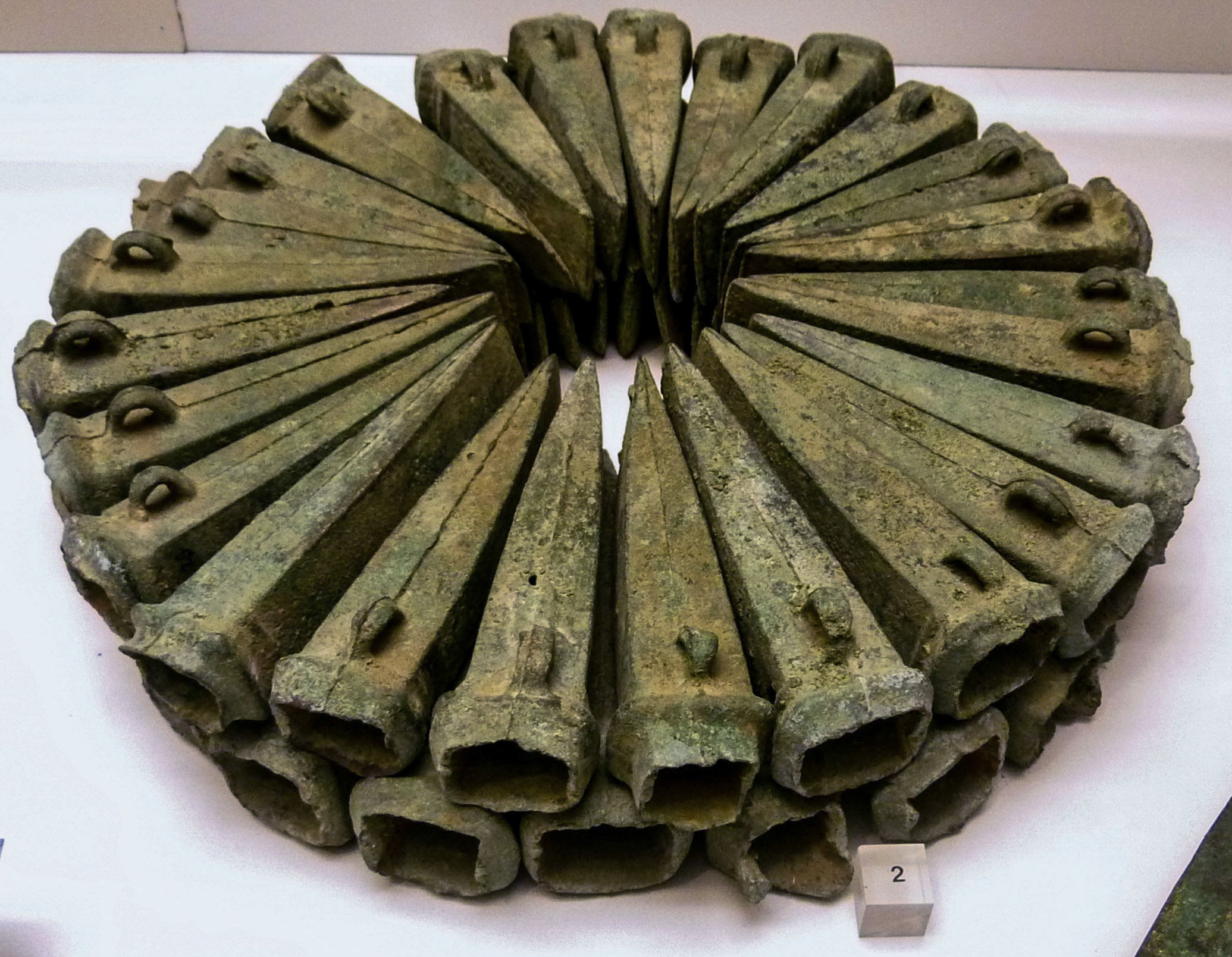 Haches à douille trouvées à Cléguérec au lieu-dit Quélenesse en 1970 (ce dépôt était constitué de 70 haches à douille pour la plupart de type "normal", mais certaines du type de Plurien).